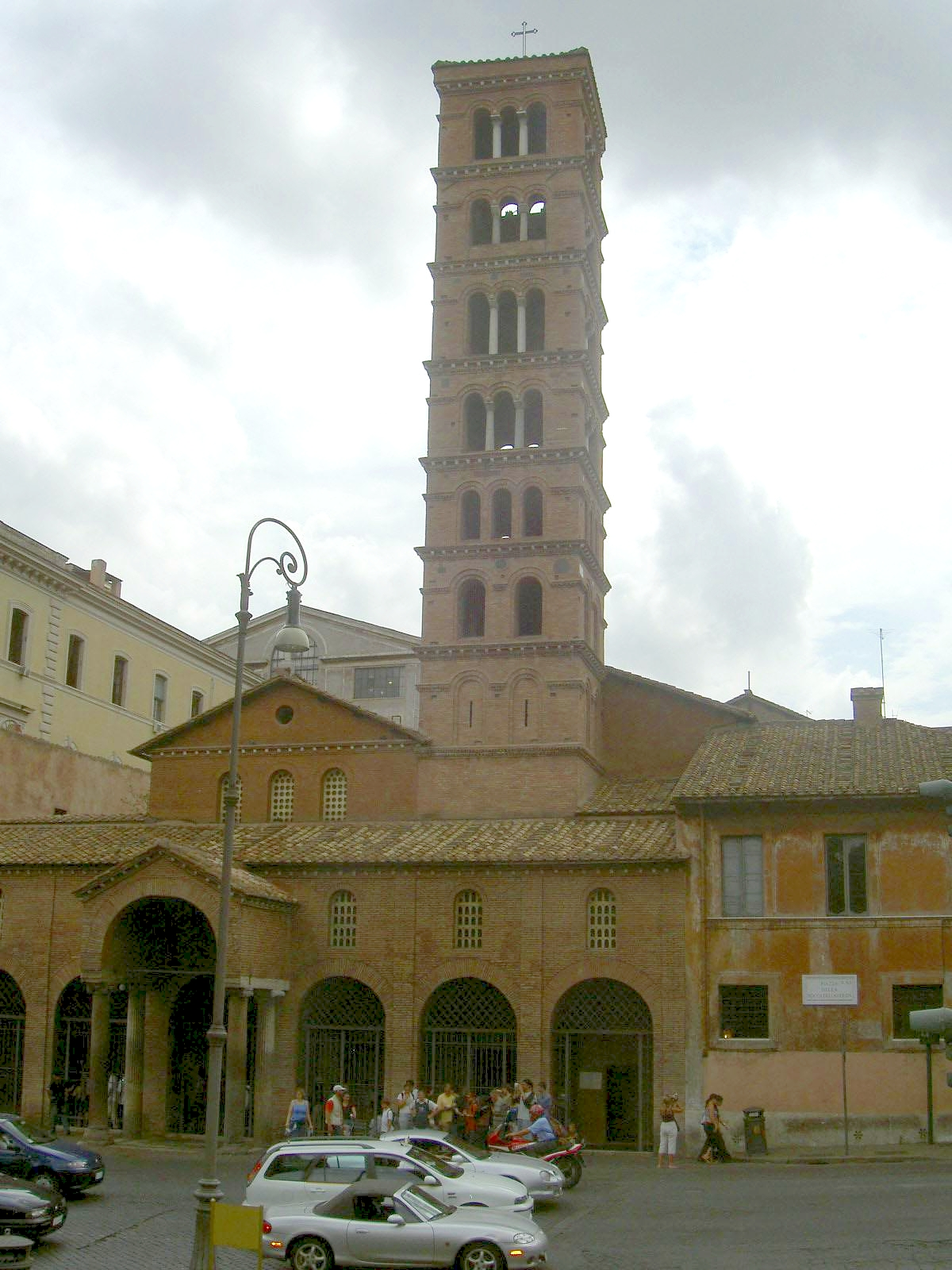 Santa Maria in Cosmedin, Rom. Bild av Alers, redigerad av Lamré.